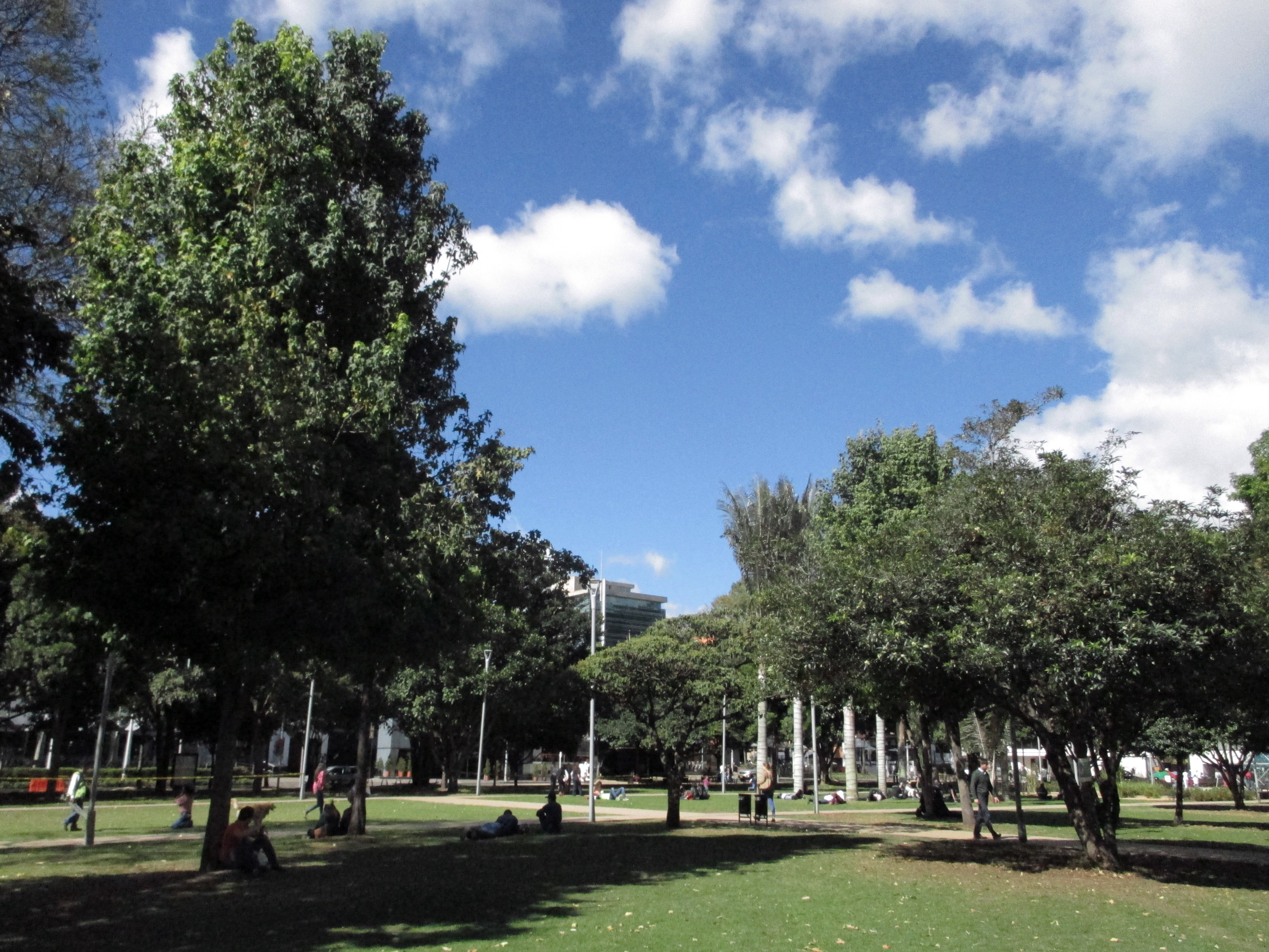 Bogotá